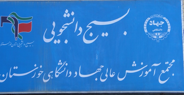 بسیج جهاد دانشگاهی